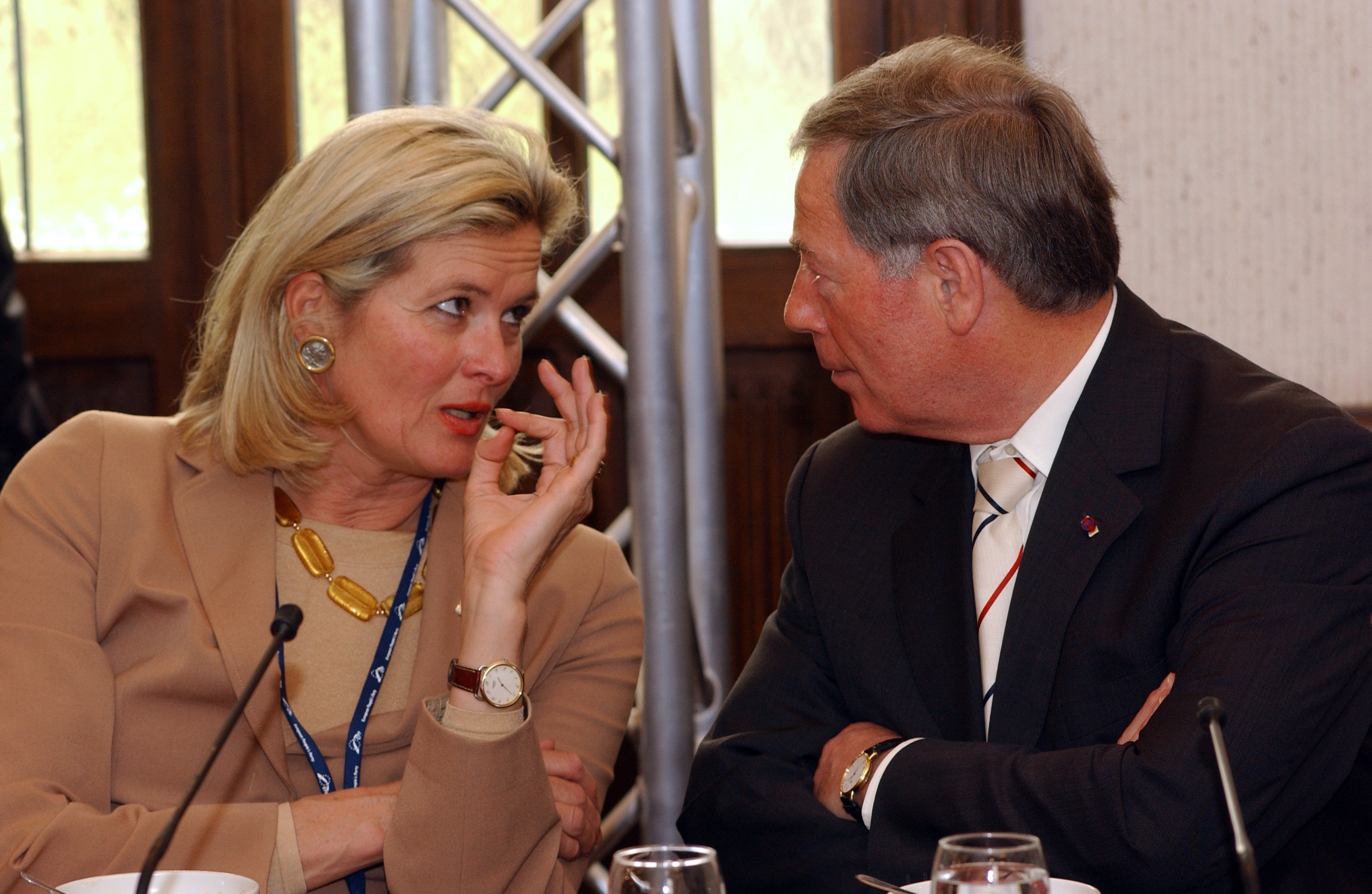 EPP Summit 22 March 2005 Meise